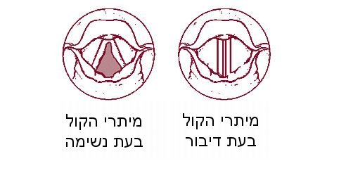 מיתרי הקול